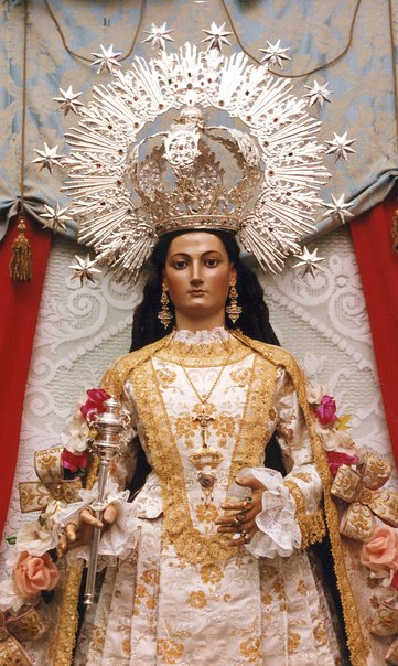 Nuestra Señora de Loreto de Algezares (Murcia) Spain